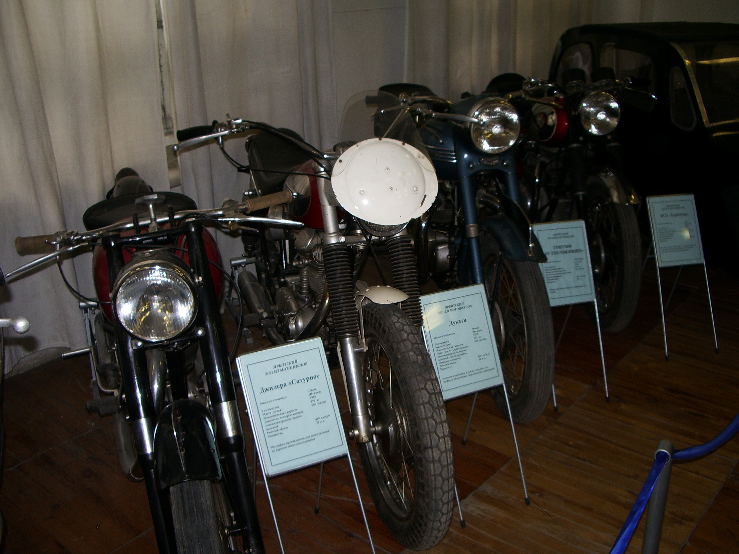 Модели зарубежной мототехники 50-х годов 20-го века.